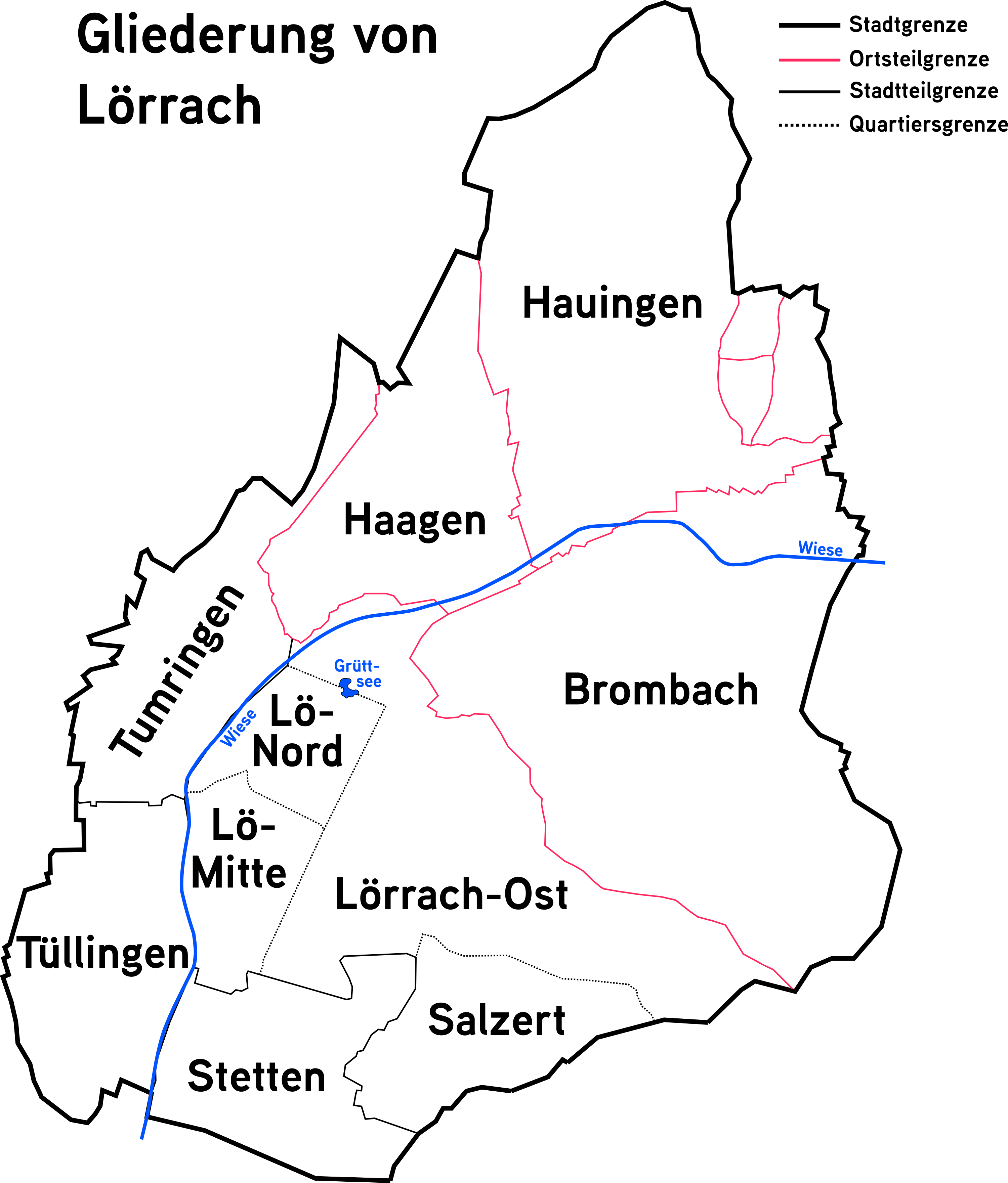 Stadtgliederung Lörrachs